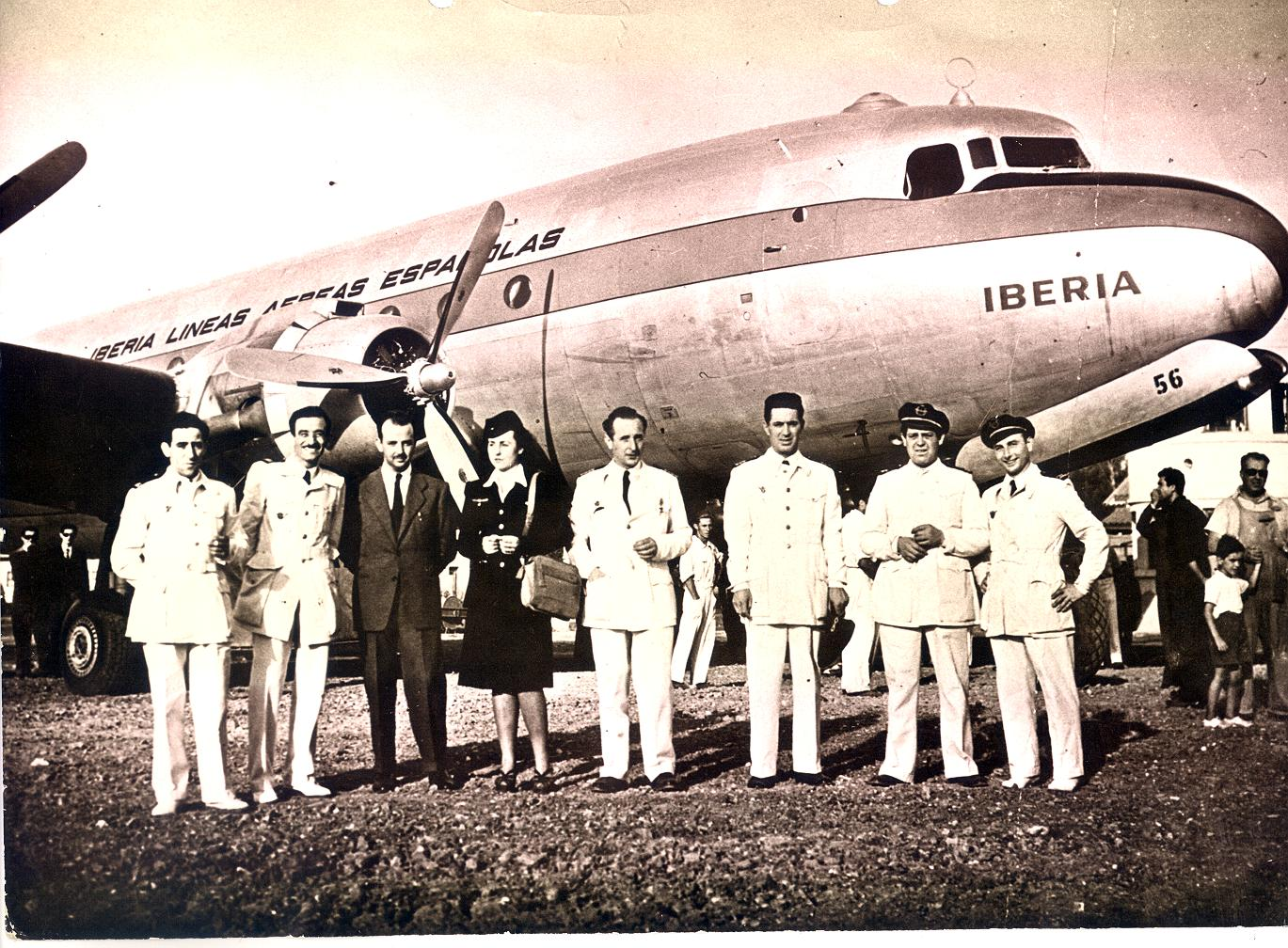 La aerolínea española da el salto a América iniciando los vuelos a Buenos Aires, con escalas en Villa Cisneros, Natal y Río de Janeiro. Se convierte así en la primera compañía que establece, después de la guerra, un servicio aéreo entre Europa y América del Sur. Iberia's Madrid-Buenos Aires flight. Vol Iberia Madrid - Buenos Aires. Voo da Iberia entre Madri e Buenos Aires Die spanische Fluggesellschaft schafft den Sprung nach Amerika und bedient nun Flüge nach Buenos Aires, mit Zwischenlandungen in Villa Cisneros, Natal und Rio de Janeiro. Somit ist sie das erste Unternehmen, dass nach dem Krieg einen Flugdienst zwischen Europa und Südamerika etabliert.